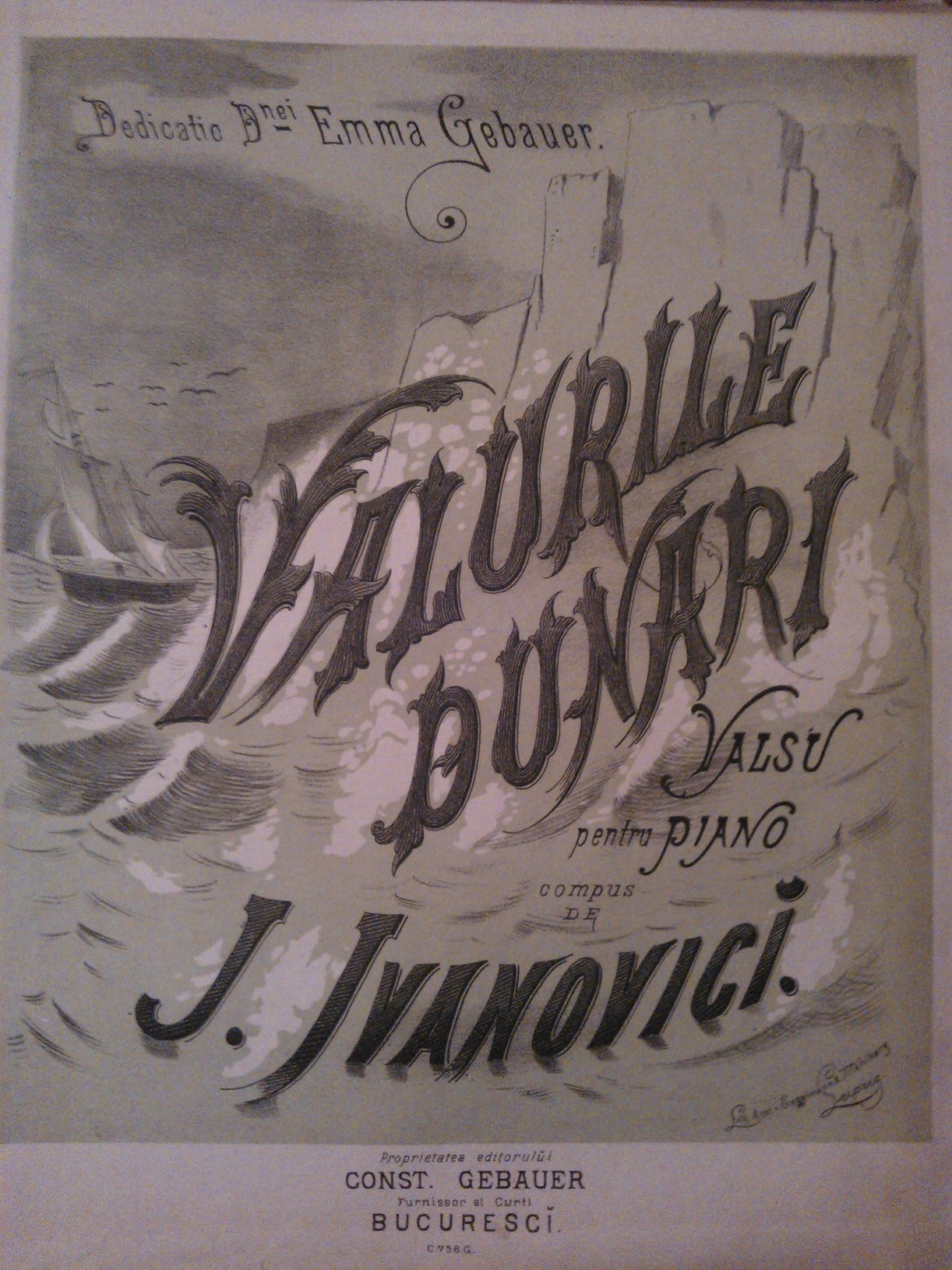 Partitura "Valurile Dunarii", compozitor Iosif Ivanovici, editata in 1883